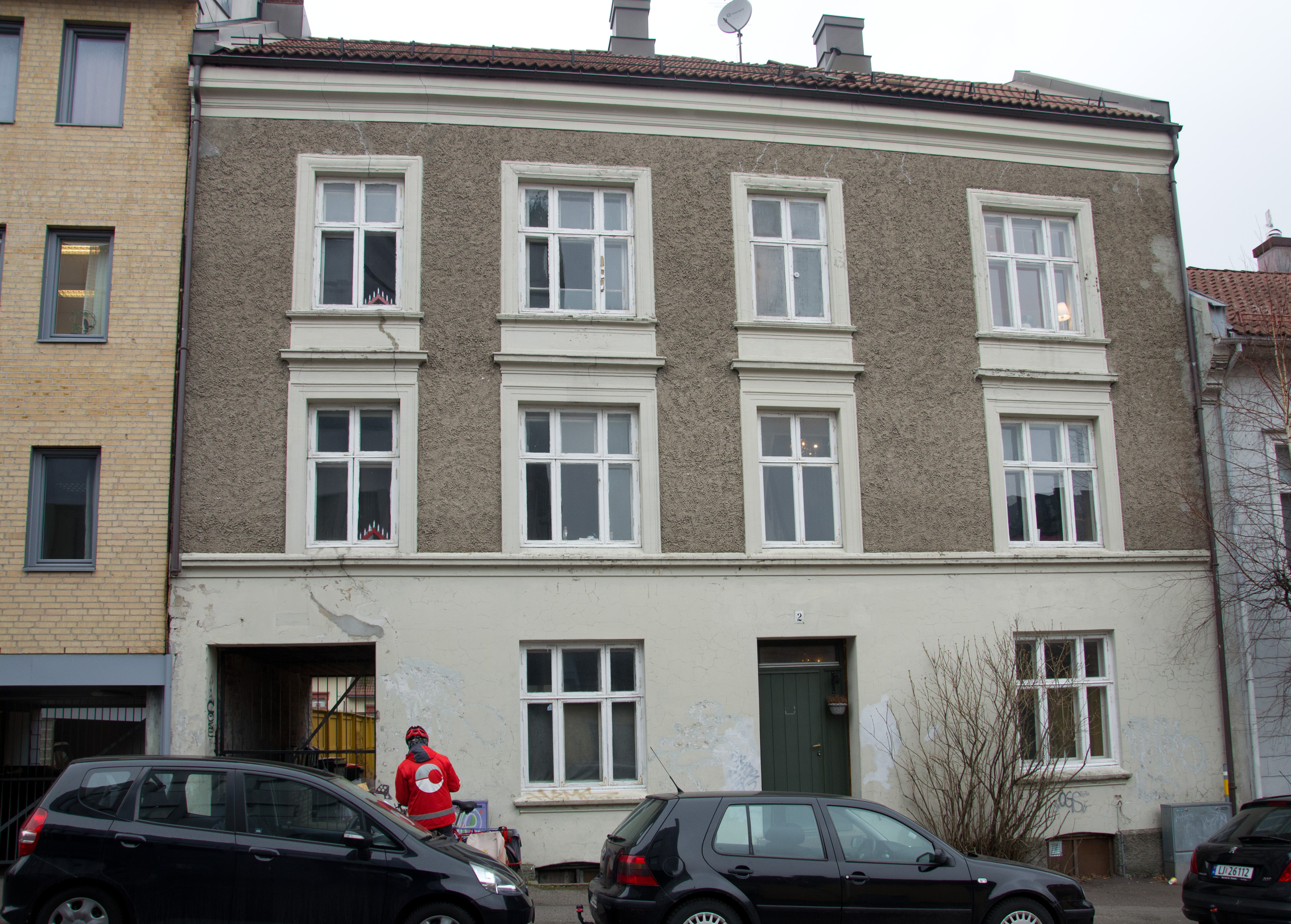 Bisp Eysteins gate 2A, Tønsberg